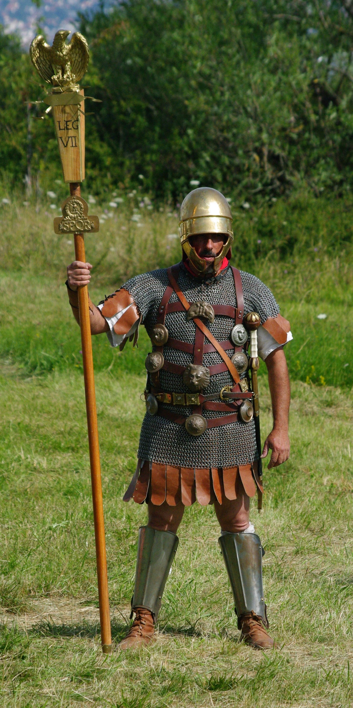 Un aquilifer romain de la période de la guerre des Gaules. Photographie réalisée le 22 juillet 2012 sur le plateau de Gergovie lors des Arverniales.